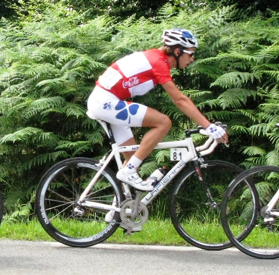 De Mickaël Cherel an der Côte de Lahaut op der 4. Etapp am Tour de Wallonie 2008. Kategorie:Franséisch Vëlossportler